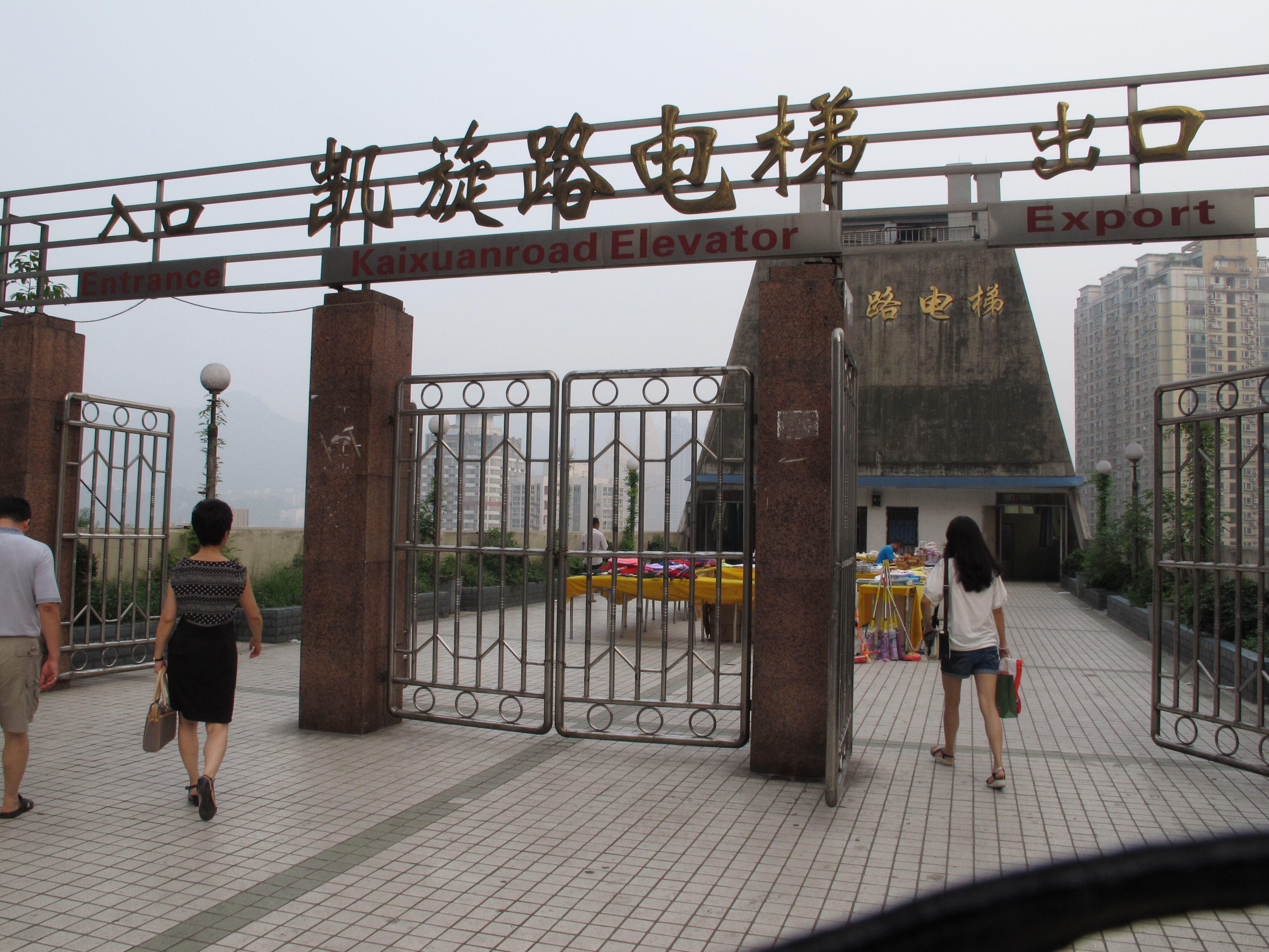 重庆市凯旋路电梯凯旋路入口 （较场口）